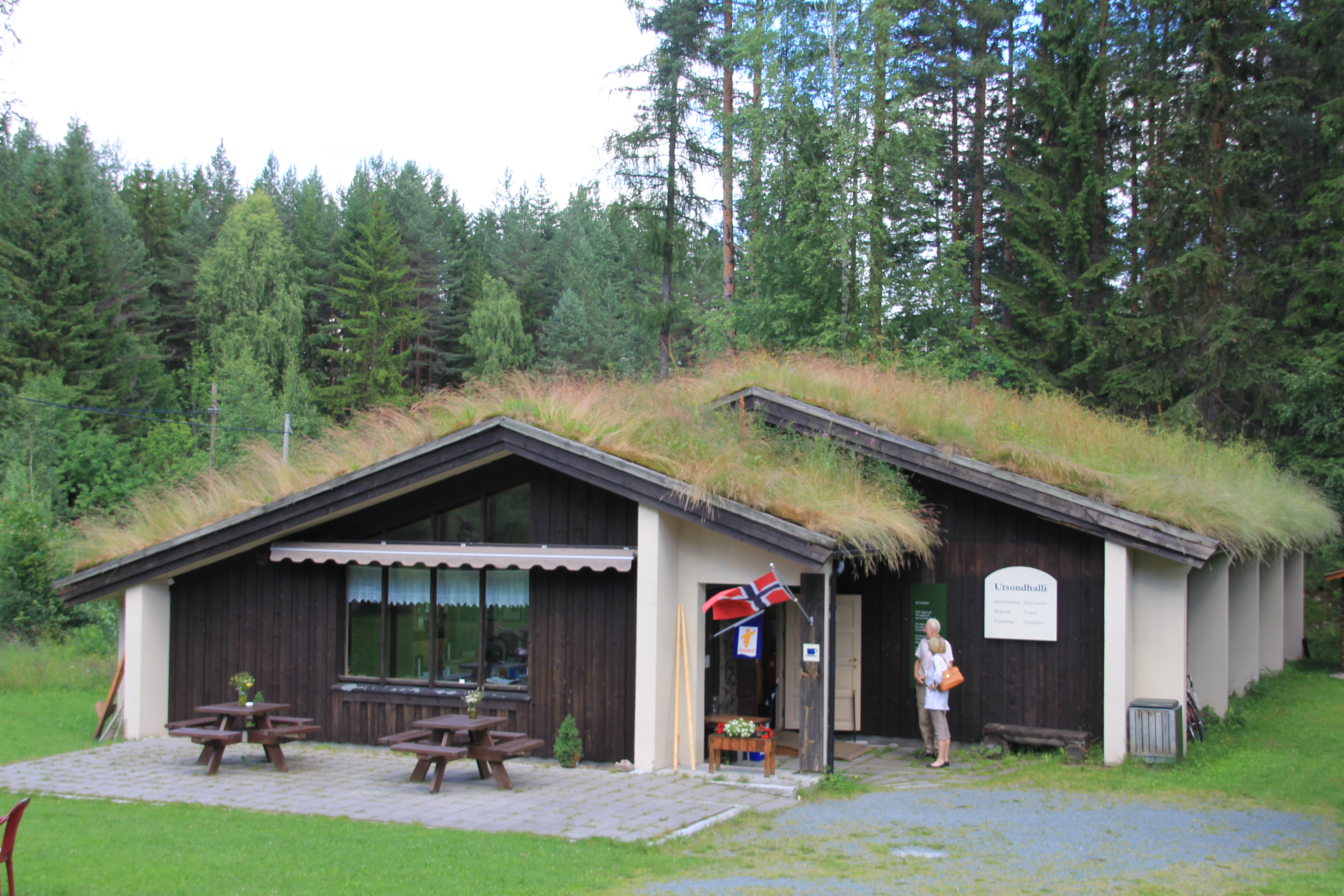 Ved Kviteseid Bygdetun ble det i 1979 bygget en utstillings- og informasjonshall kalt Utsondhalli.